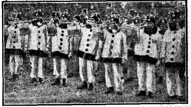 Le Soutien de Saint-Gilles, bigophones belges à la Mi-Carême à Paris 1926.